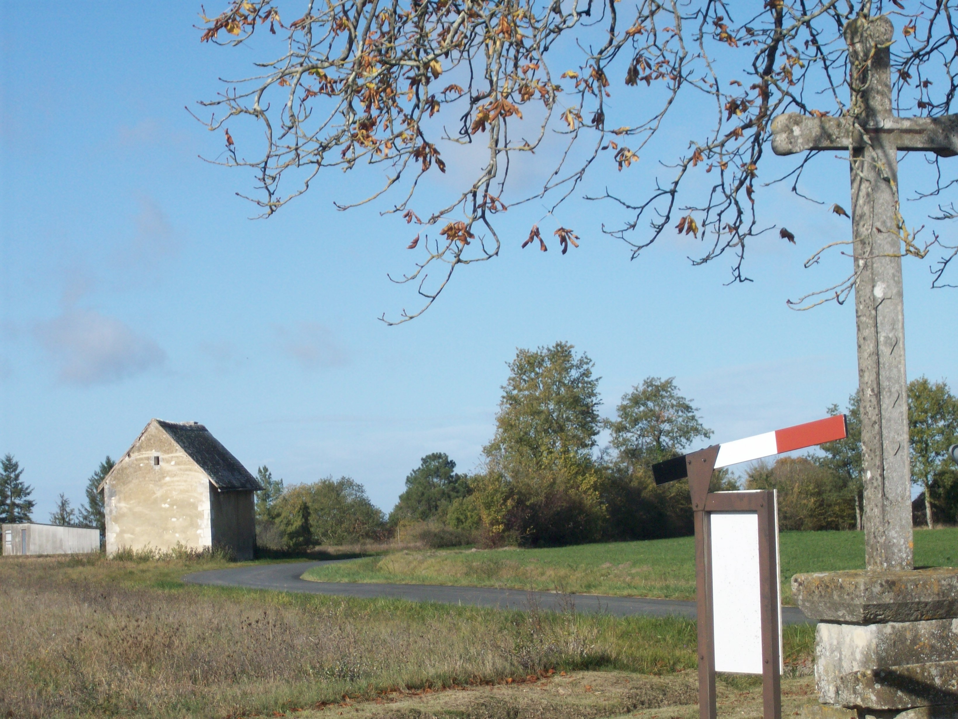 Signalisation (reconstitution) de la ligne de démarcation entre Cussay et Ligueil, Indre-et-Loire. La maison de vigne au second plan abritait le poste de garde allemand (1940-1943).